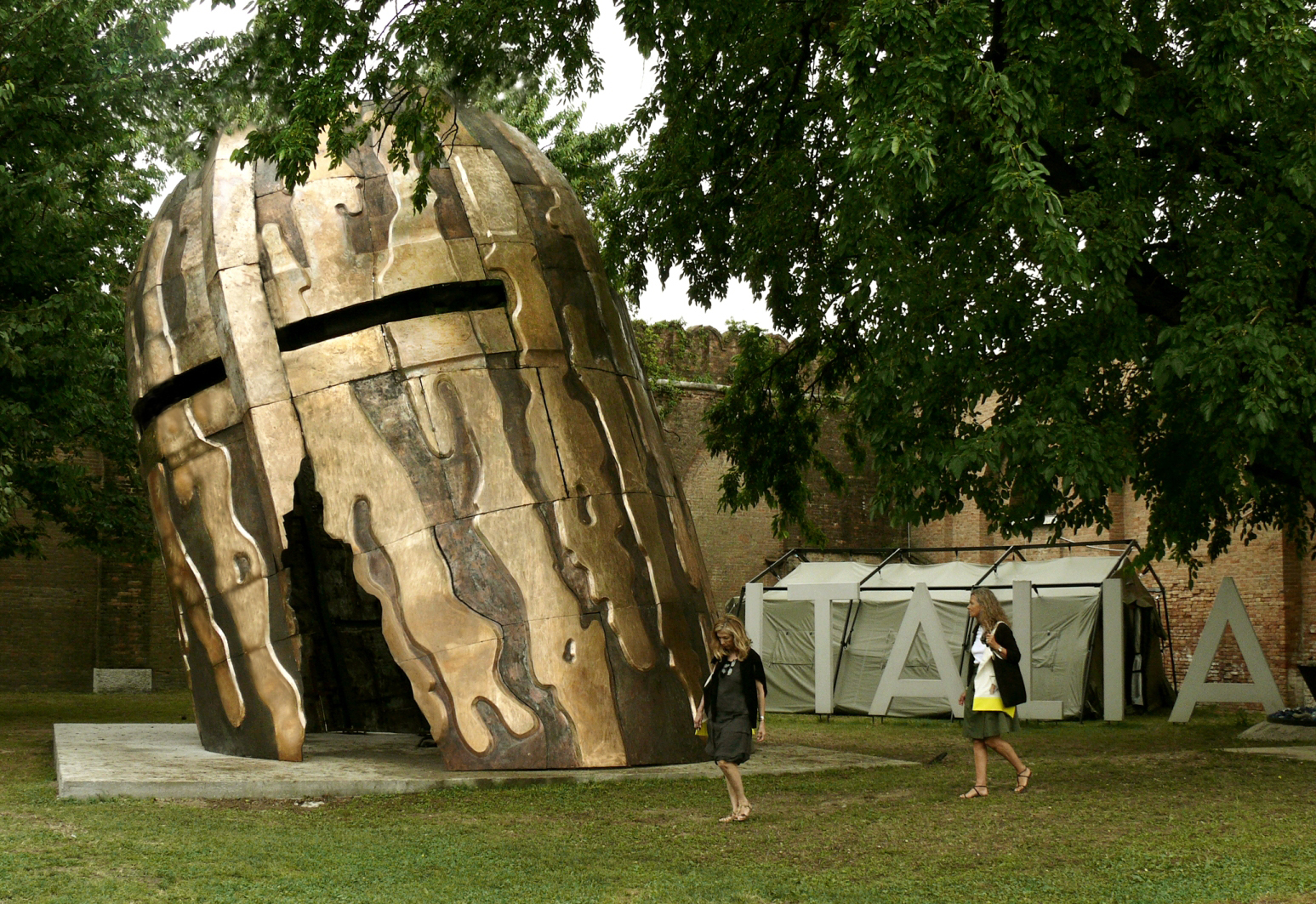 54 Biennale di Venezia 2011 - Elmo di Ettore Fieramosca destinato alla sua città natale Capua.